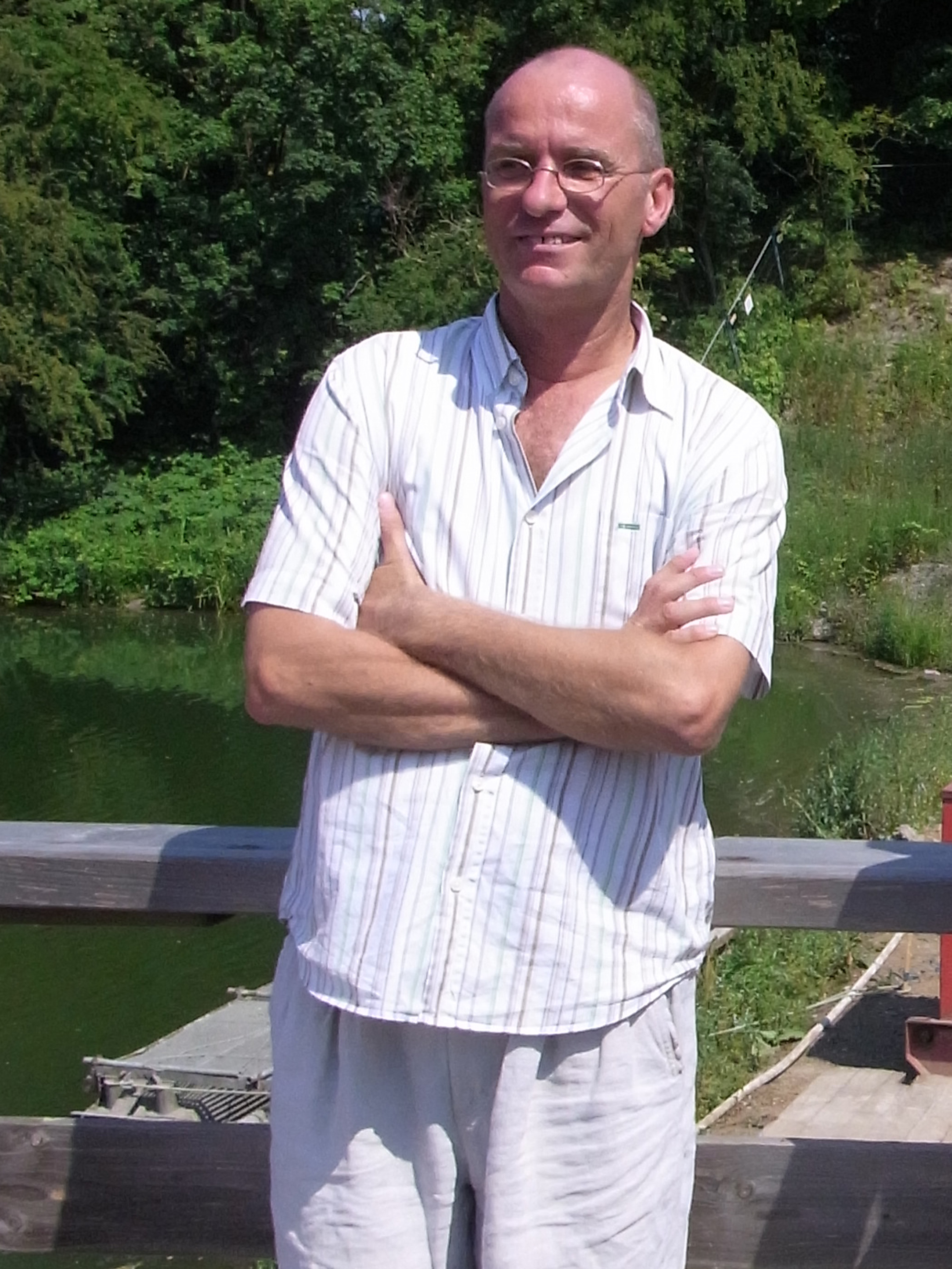 Emscherkunst.2010 Florian Matzner Kurator der Ausstellung